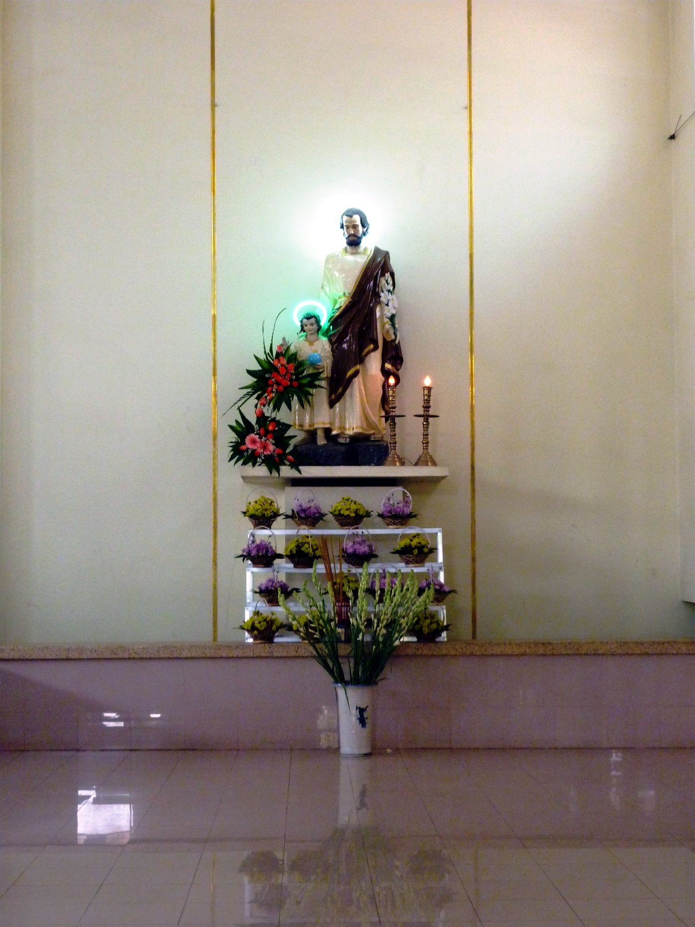 Tượng Thánh Giuse (Joseph) tại nhà thờ Bùi Thượng, Biên Hòa, Đồng Nai